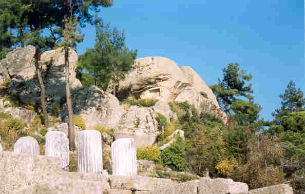 Labranda, Felsengraeber, Bild Thomas Kutzli Januar 2003, GNU-FDL